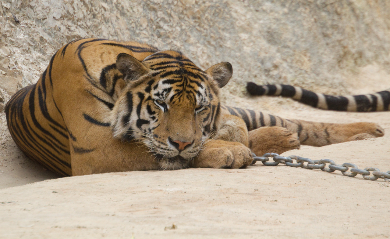 Tiger Temple